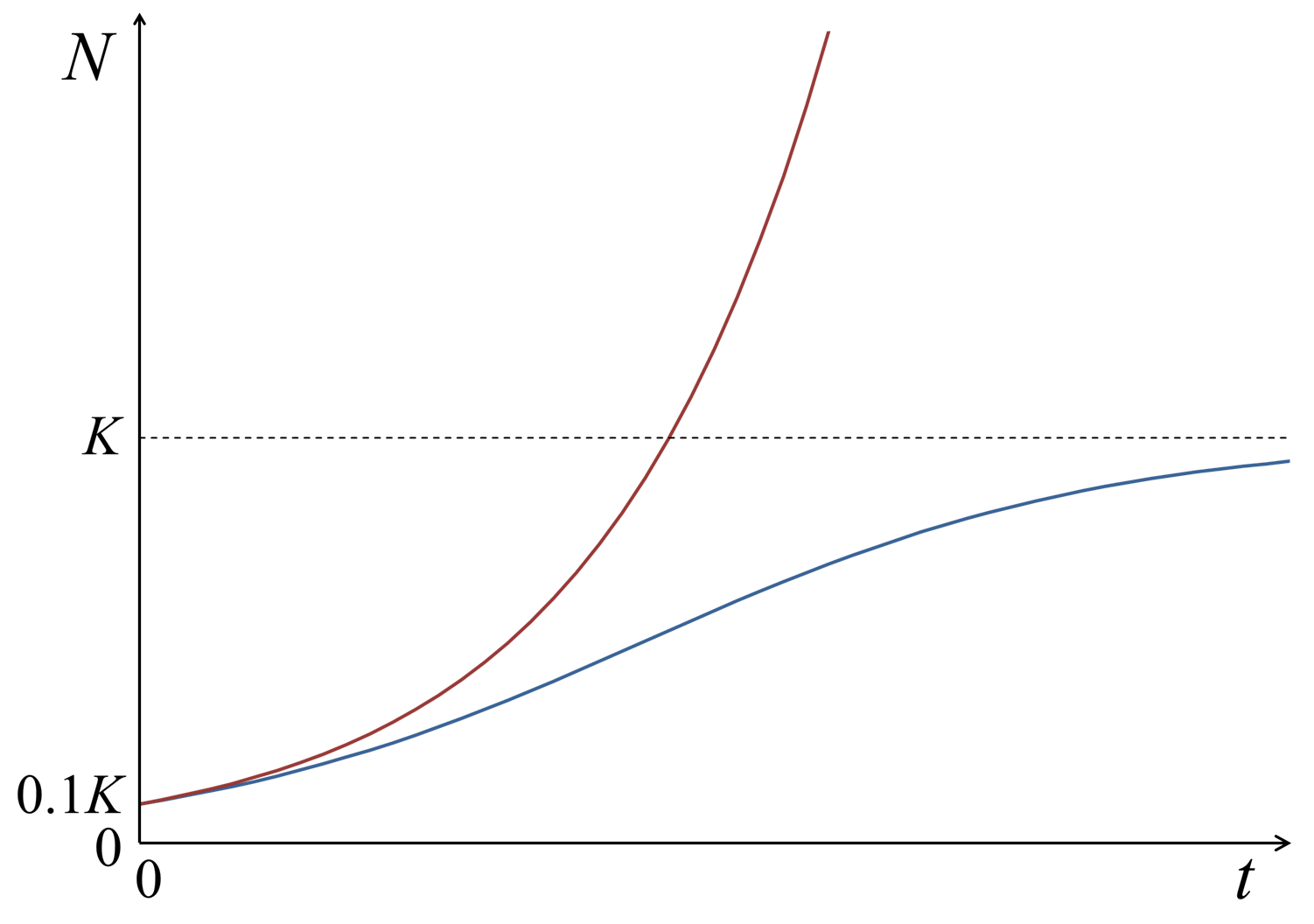 マルサス増加曲線とロジスティック増加曲線